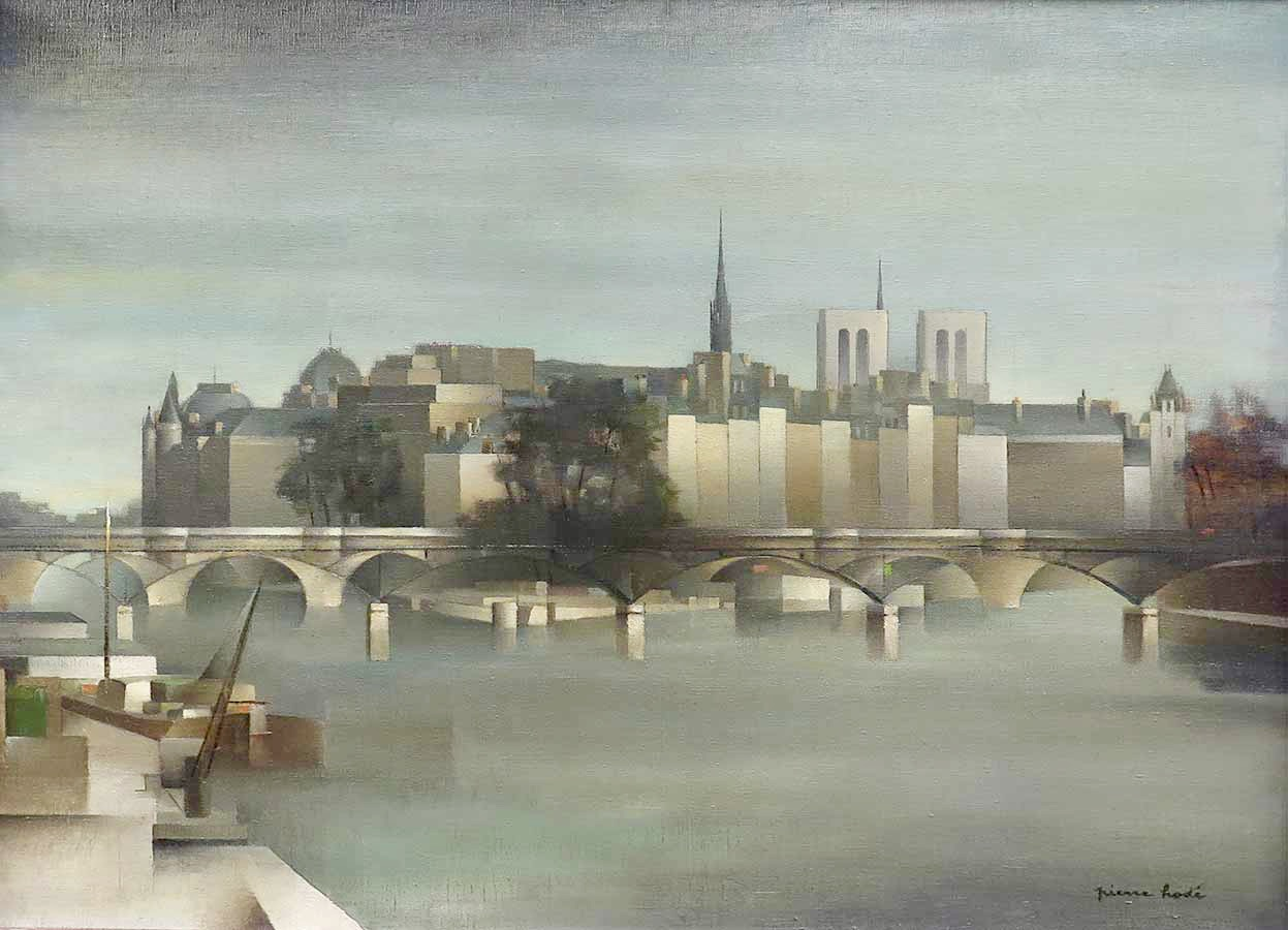 Paris, le pont des Arts et l’île de la Cité - Notre-Dame